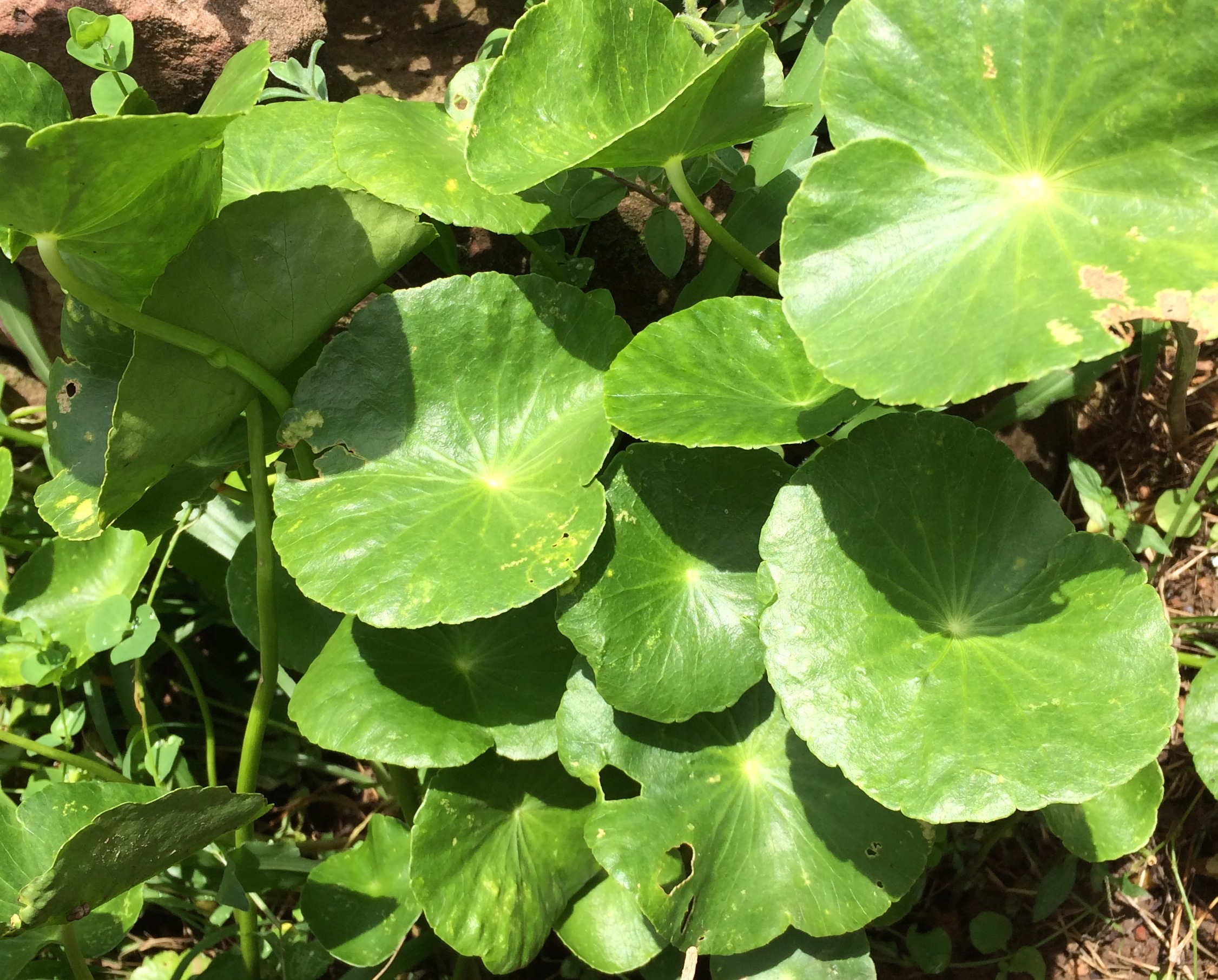 lotus de terre, feuilles acidulées comestibles